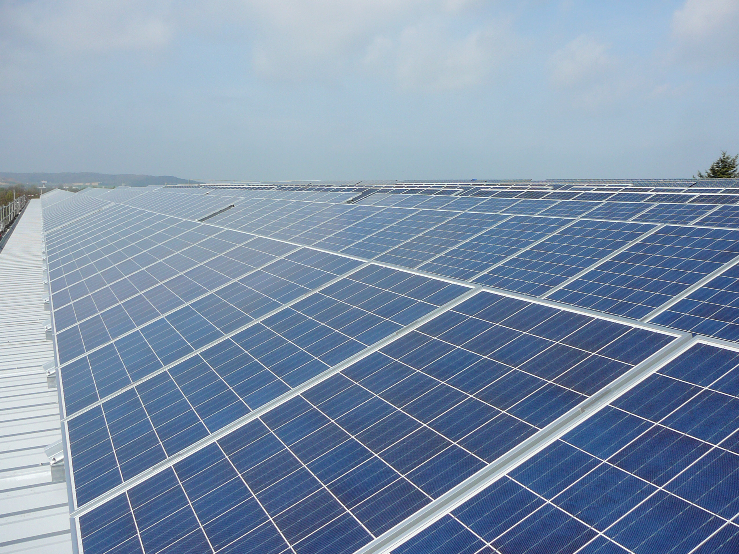 Das Bild zeigt die Solaranlage auf dem AS Solar Firmengebäude in Hannover.